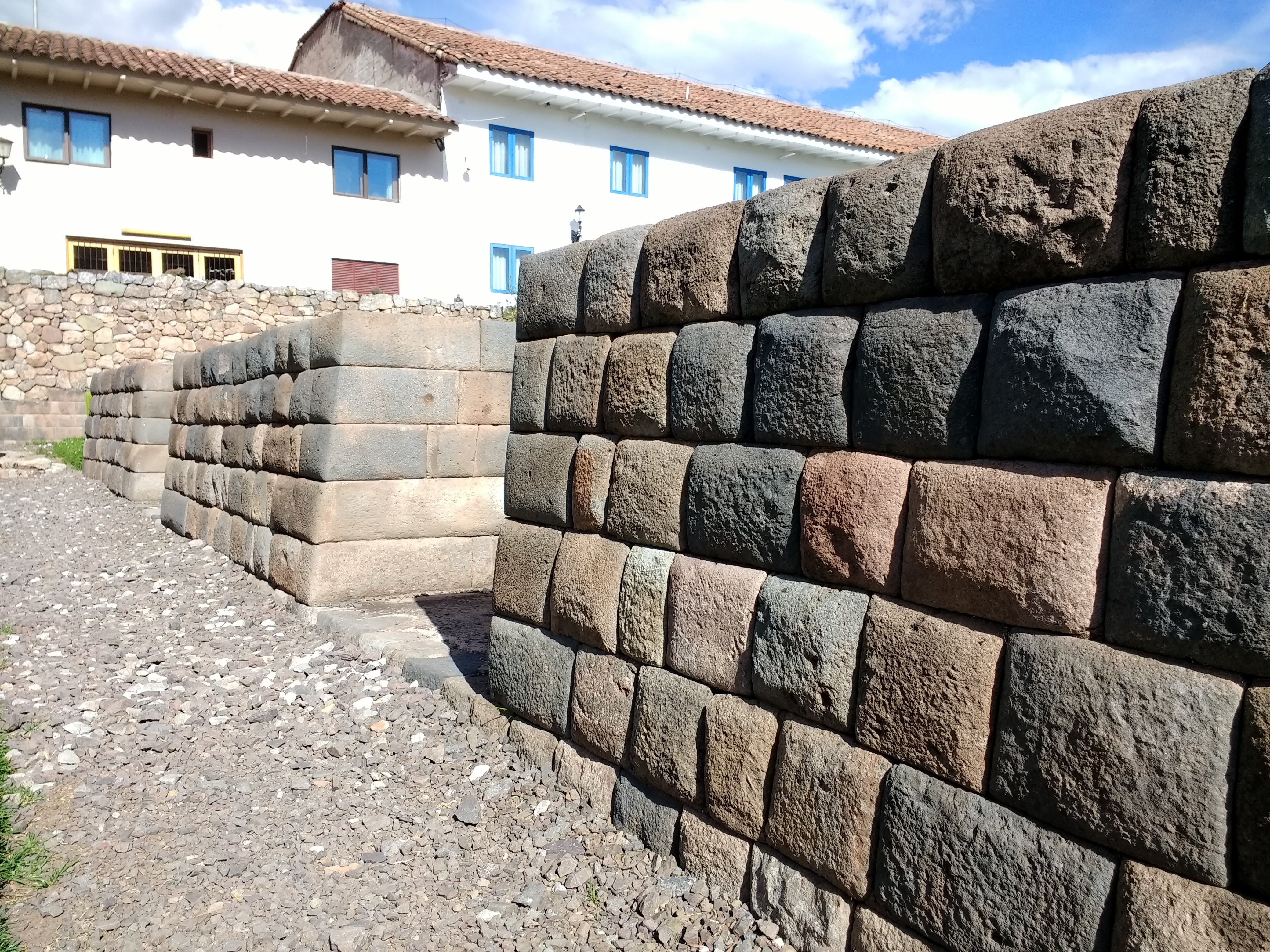 Palacio Inka del Kusikancha en Cusco.